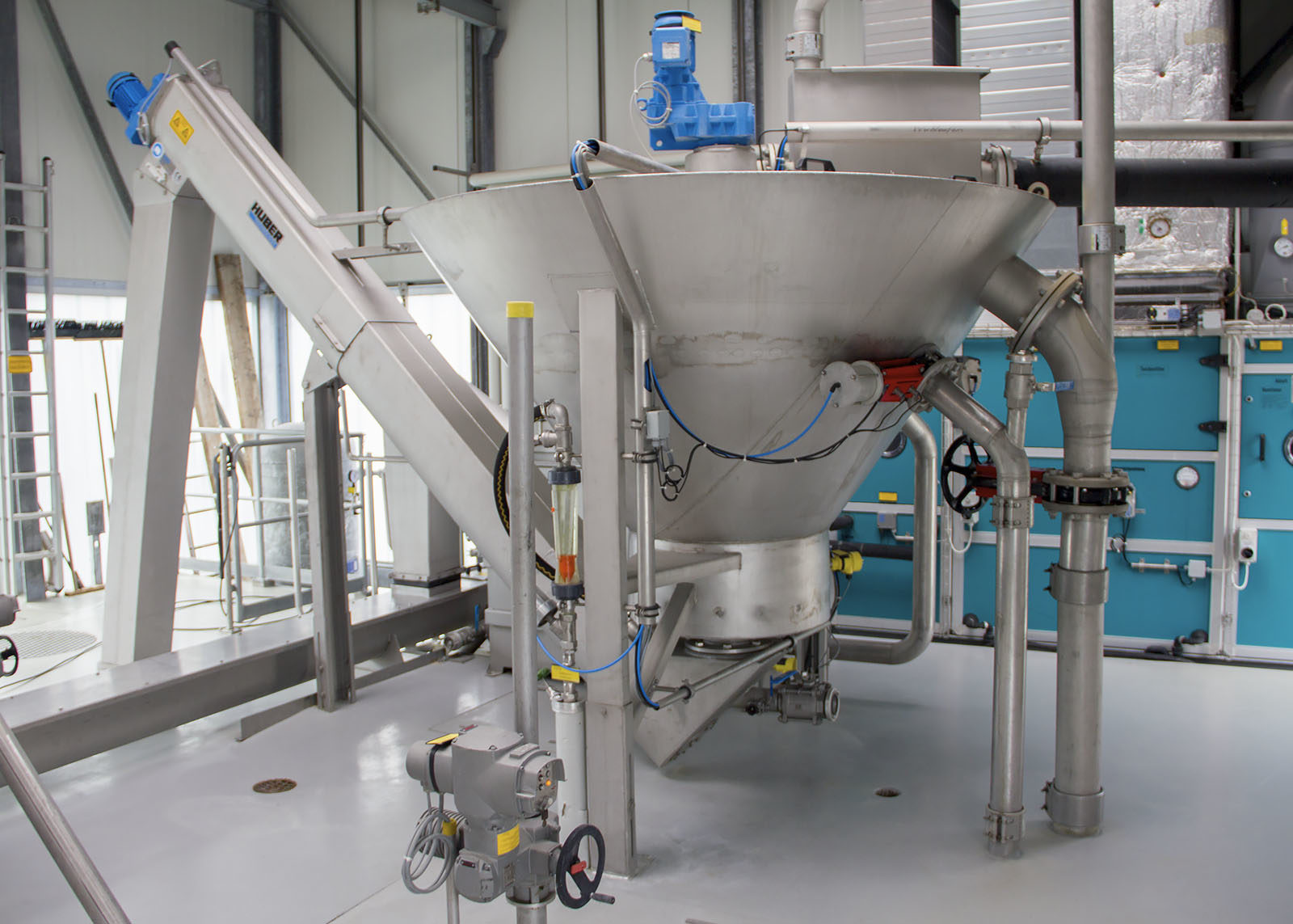 Sandwaschanlage in der ARA Worblental in Worblaufen